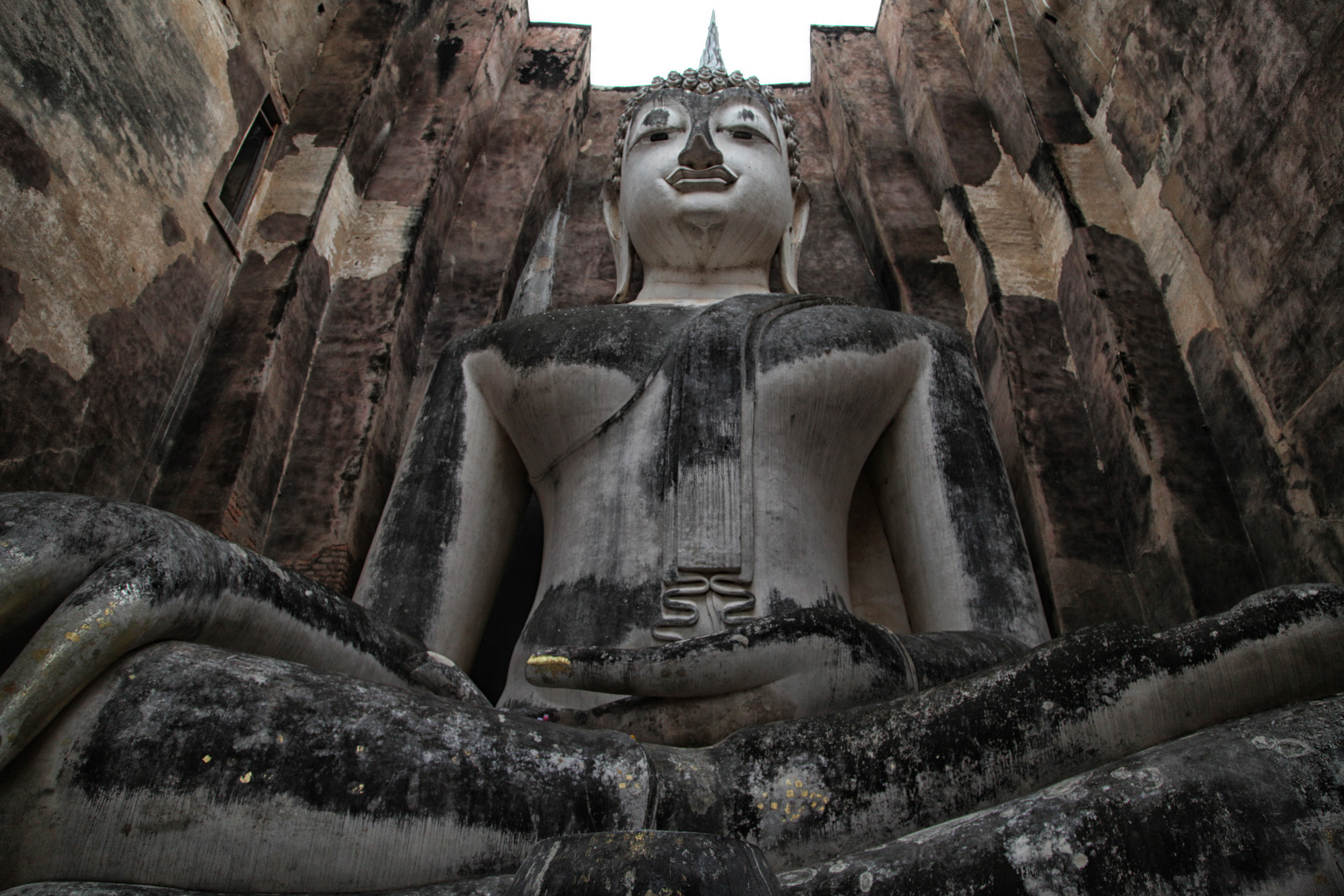 วัดศรีชุม